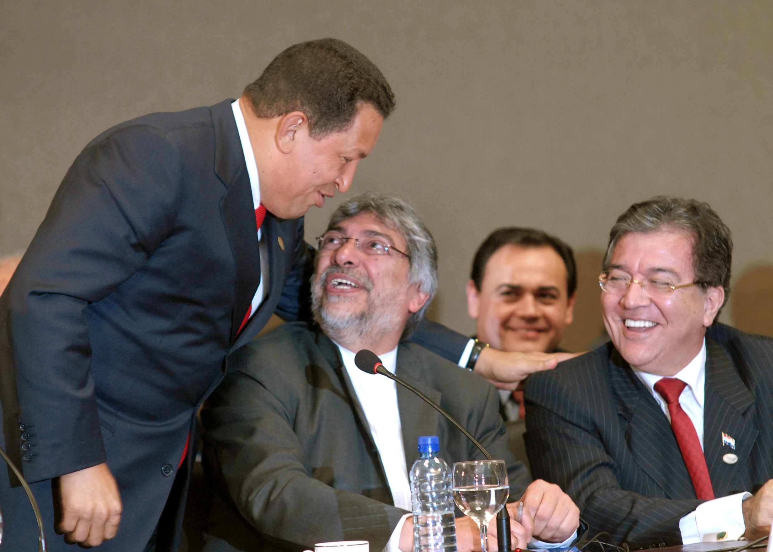 Brasília - Presidente da Venezuela, Hugo Chávez, conversa com presidente eleito do Paraguai, Fernando Lugo, durante reunião da União de Nações Sul-Americanas (Unasul). O encontro servirá para que os representantes assinem o tratado de constituição da organização, que existe apenas informalmente.